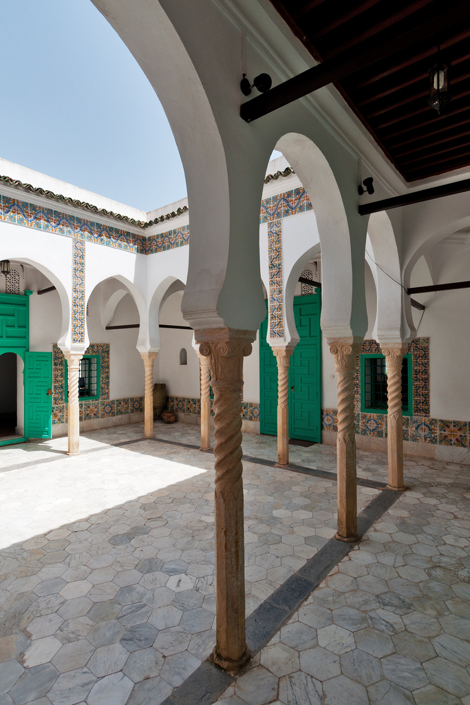 1715, c’est la date supposée de fondation de Dar Abdellatif, qui aura connu jusqu’à sa réquisition par l’armée française, nombre de propriétaires. Le dernier propriétaire algérien, Sieur Abdellatif, lui laissera par ailleurs son nom. La villa a accueilli une centaine de peintres et d’artistes du monde entier, avant d’être l’objet d’une restauration de 2006 à 2008. Depuis, le lieu retrouve une seconde vie grâce à des résidences d’artistes, des expositions, tout en abritant tout au long de l’année le siège social de l’Agence Algérienne pour le Rayonnement Culturel (AARC).